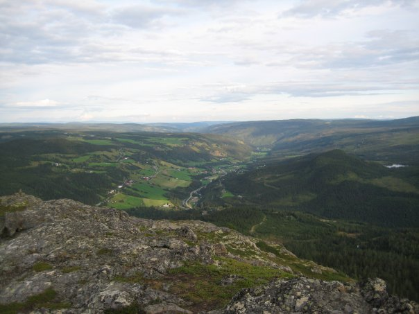 Svatsum sett i fra Nessettrona